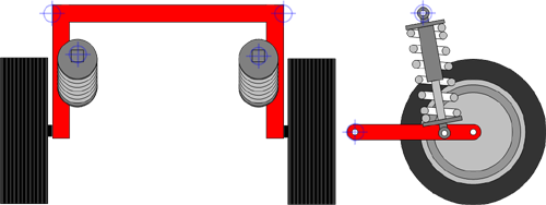 Dessin technique de suspension de type pont oscillant, créé pour Wikipedia. Mai 2005 Guillaume Chane Sha Lin